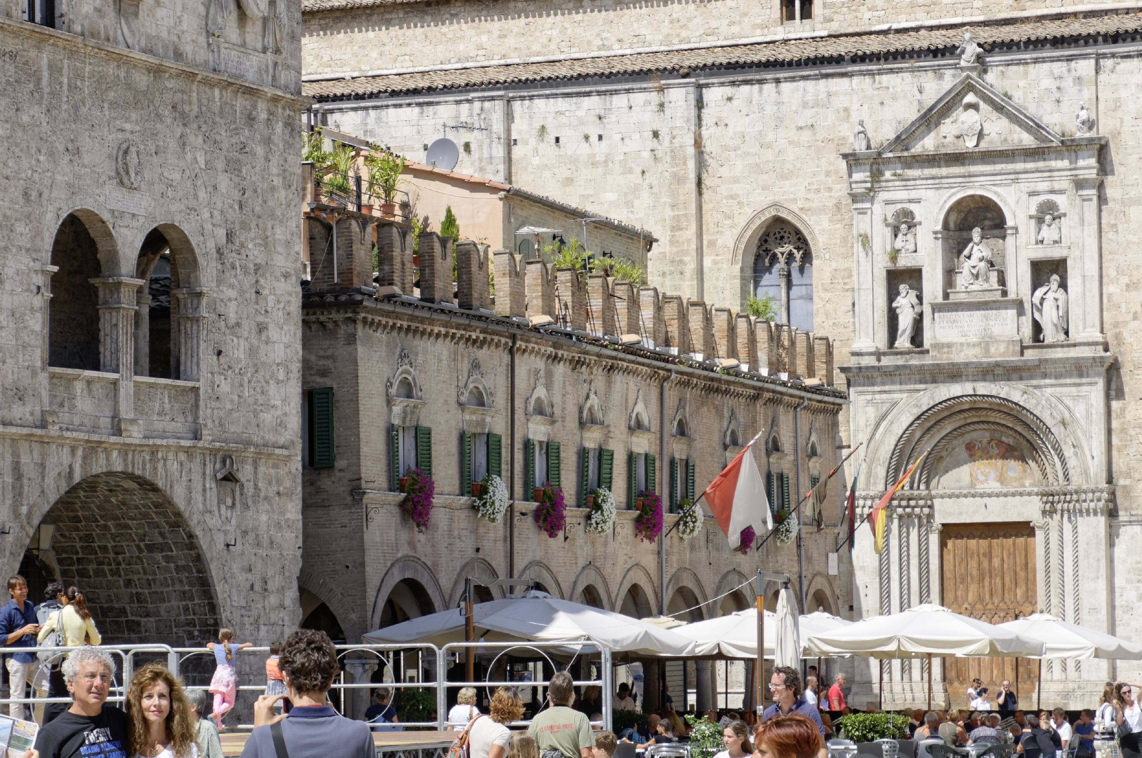 Ascoli Piceno 2015 Dieses Foto entstand in Zusammenarbeit mit Stadtbesichtigungen.de Die Seiten Stadtbesichtigungen.de, der dazugehörige Reise Blog sowie die Facebookseite: Stadtbesichtigungen Rom dürfen dieses Bild für Ihre Veröffentlichungen ohne den Hinweis auf Wikipedia, Commons bzw der Lizenz verwenden. Die Verantwortlichen habe von mir (Ra Boe) die Originaldaten zur freien Verfügung übermittelt bekommen.